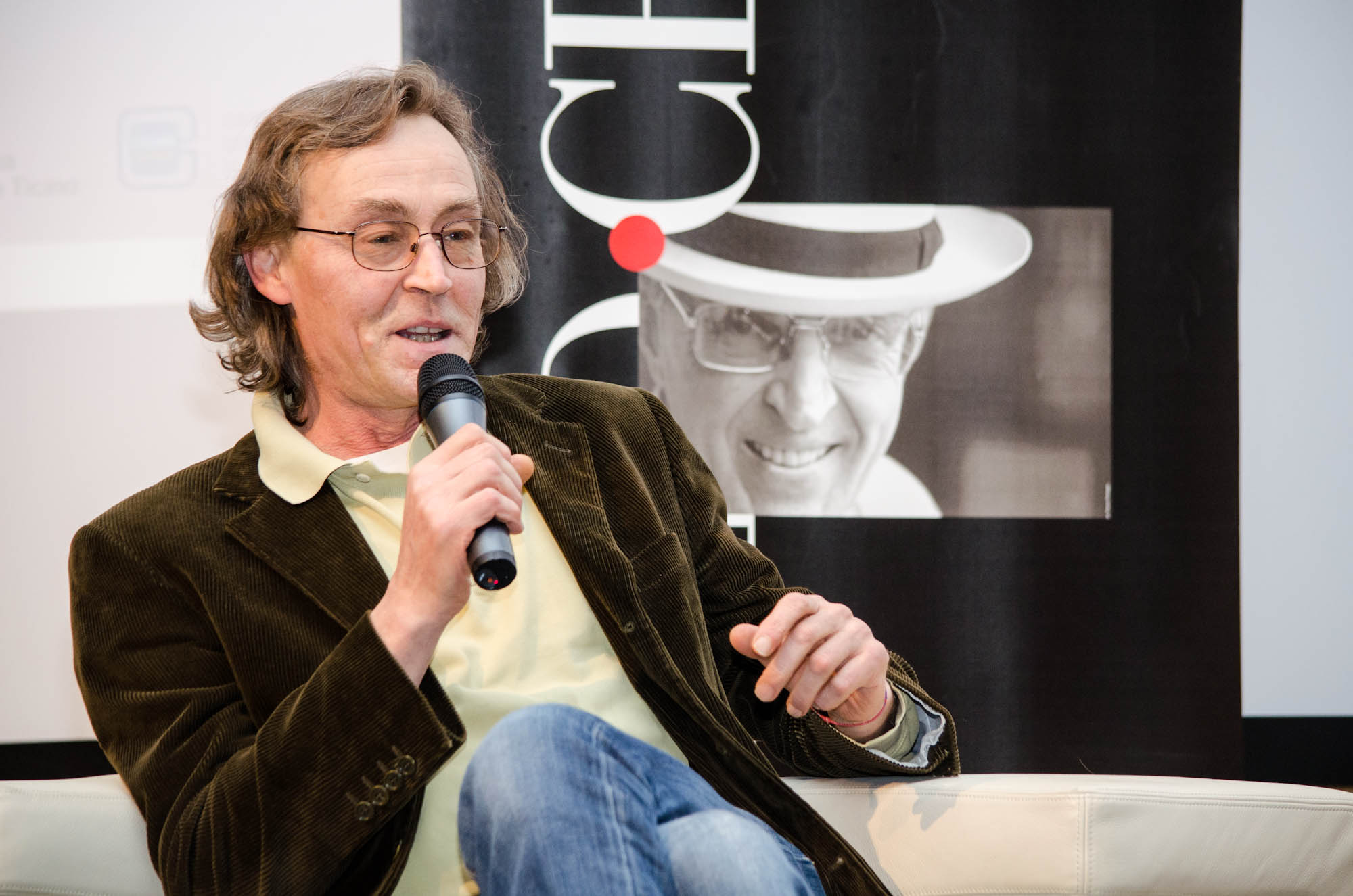 PremioChiara2013-110